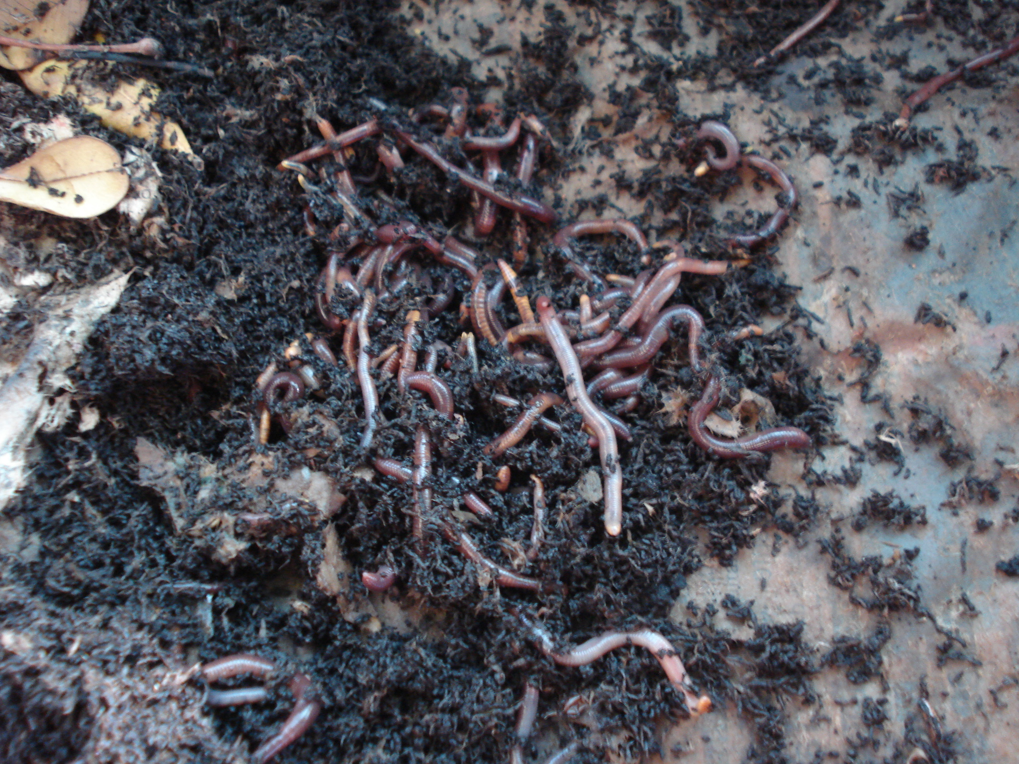 Vermicompostagem de Fração Orgânica de Resíduos Sólidos Urbanos